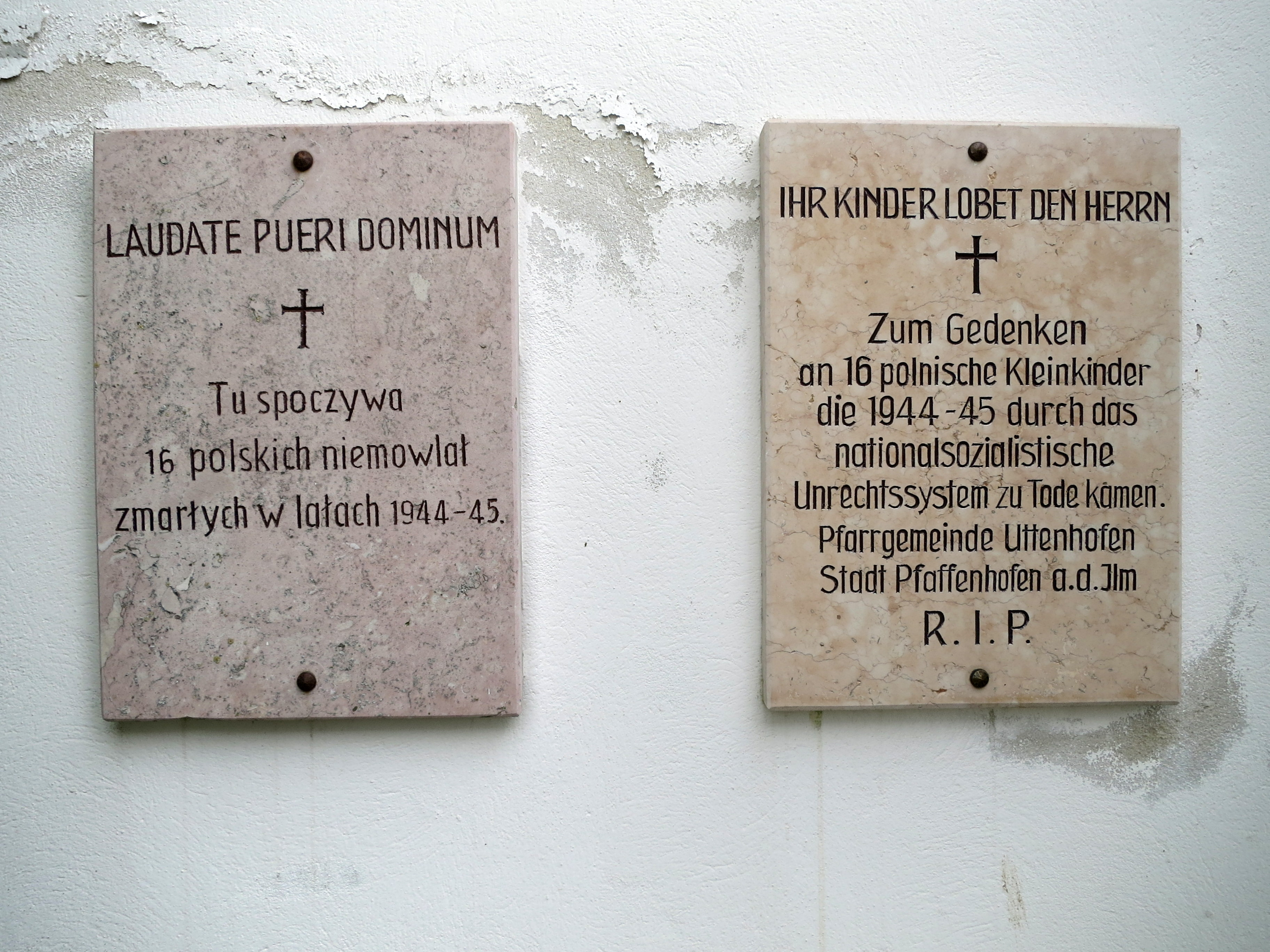 An der Friedhofsmauer der Pfarrkirche St. Sebastian angebracht